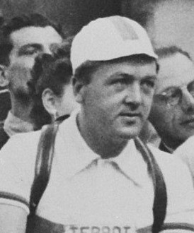 Tour de France 1950. De Nederlandse ploeg bij de start in Parijs. Vl r. (...) Wim de Ruyter (...)